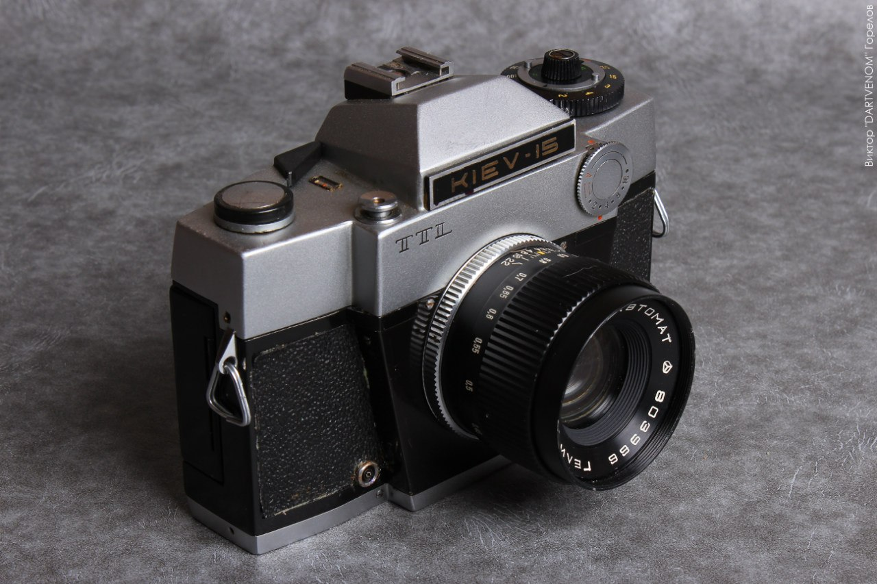 Фотокамера Киев-15